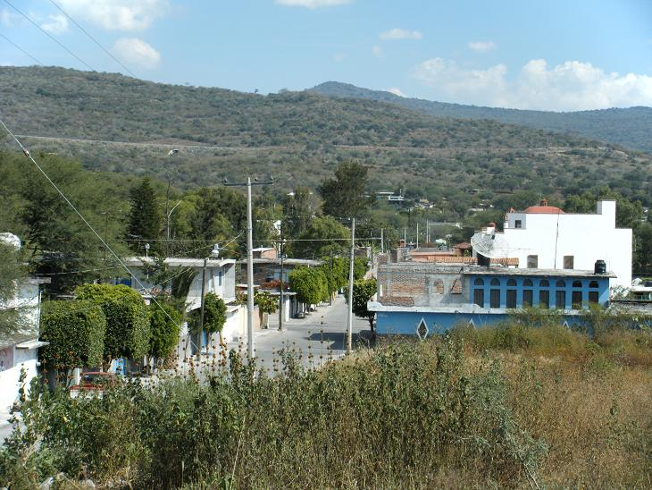 San José Cuaracurío municipio de Uriangato